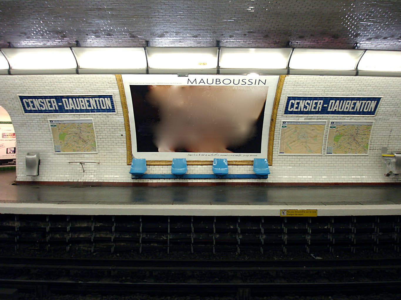 Station Censier - Daubenton de la ligne 7 du métro de Paris, France.